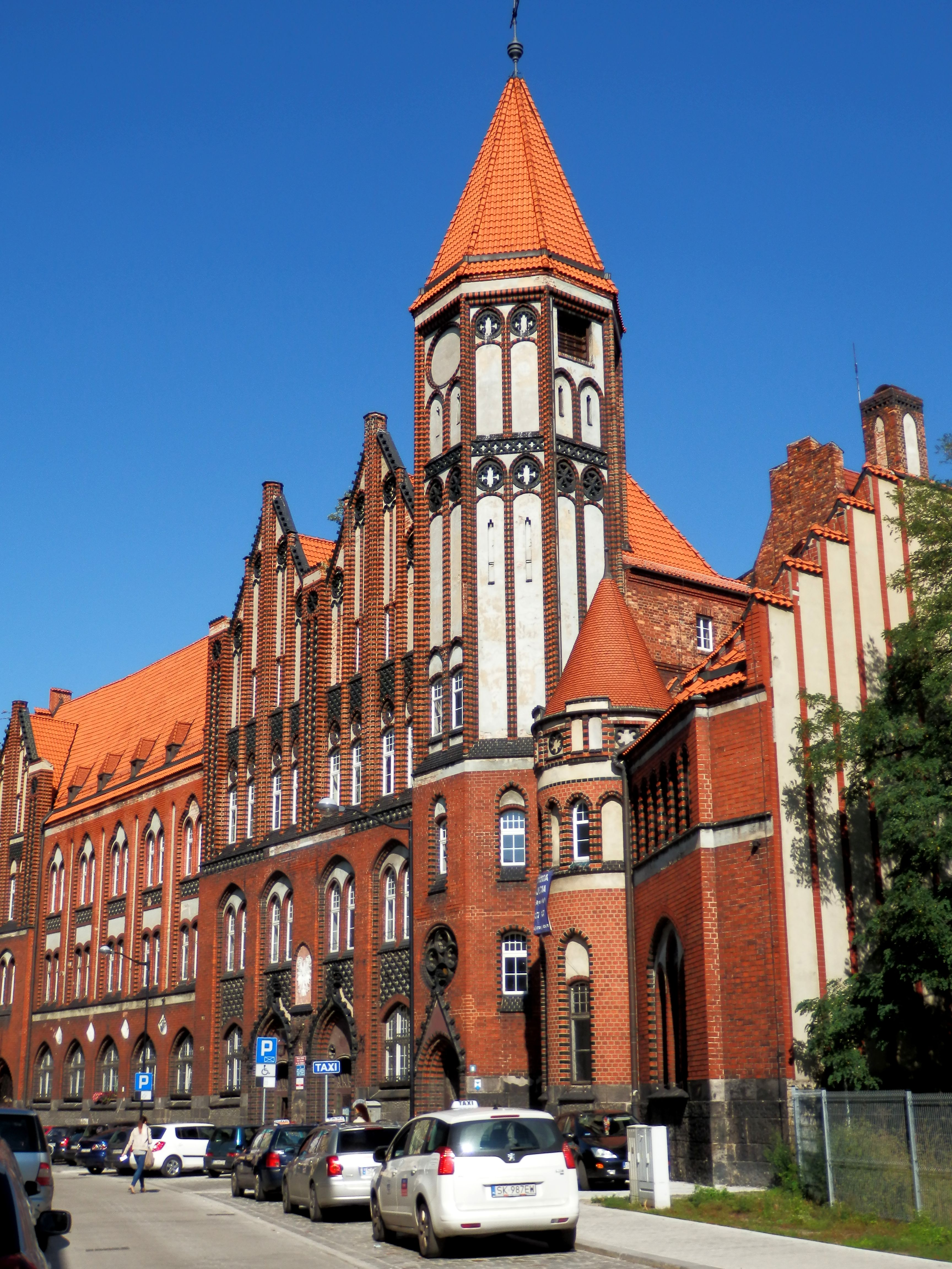 Gliwice, Budynek Poczty Głównej z przełomu XIX i XX wieku w stylu historyzmu z elementami neogotyku, murowany. Granice ochrony obejmują całą działkę.